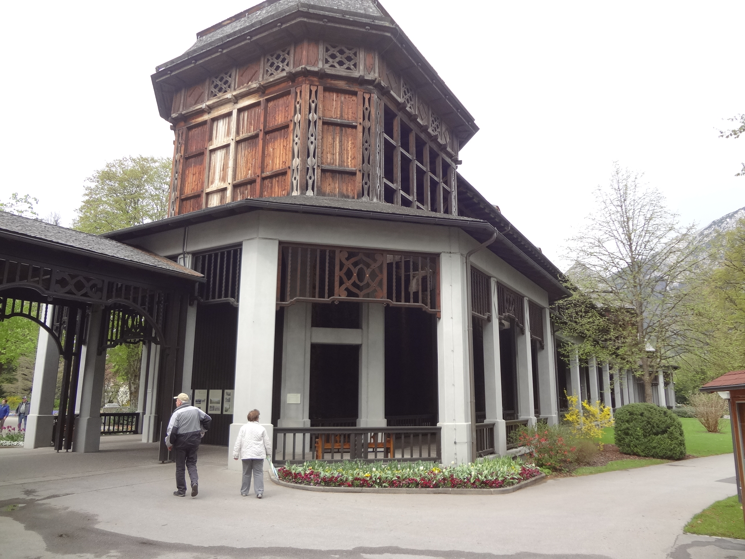 Vue extérieure de l' «inhalateur extérieur de saumure alpine» (Gradierwerk).